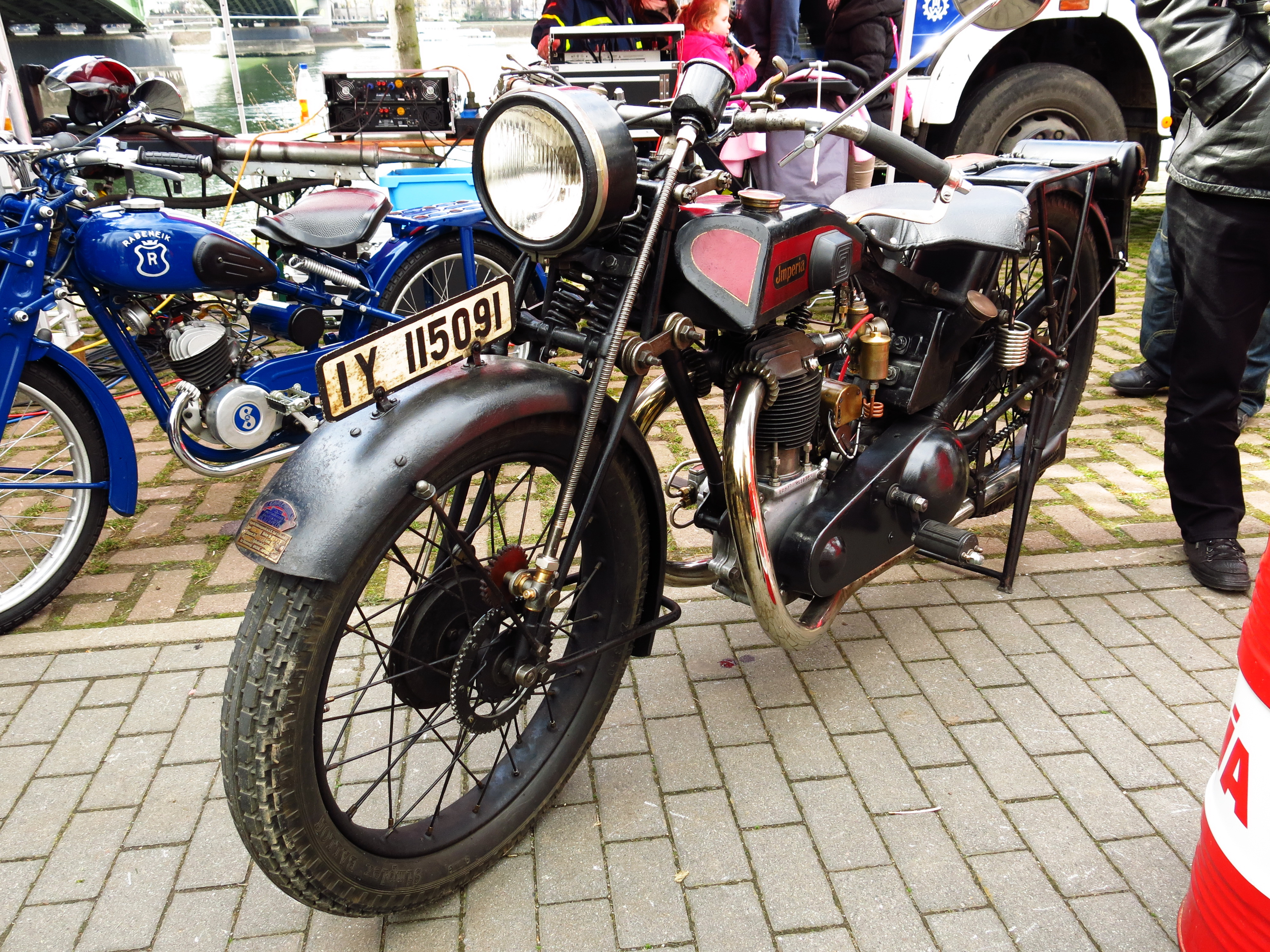 Imperia beim Oldtimertreffen "Beuel Classics" 2015 in Beuel.